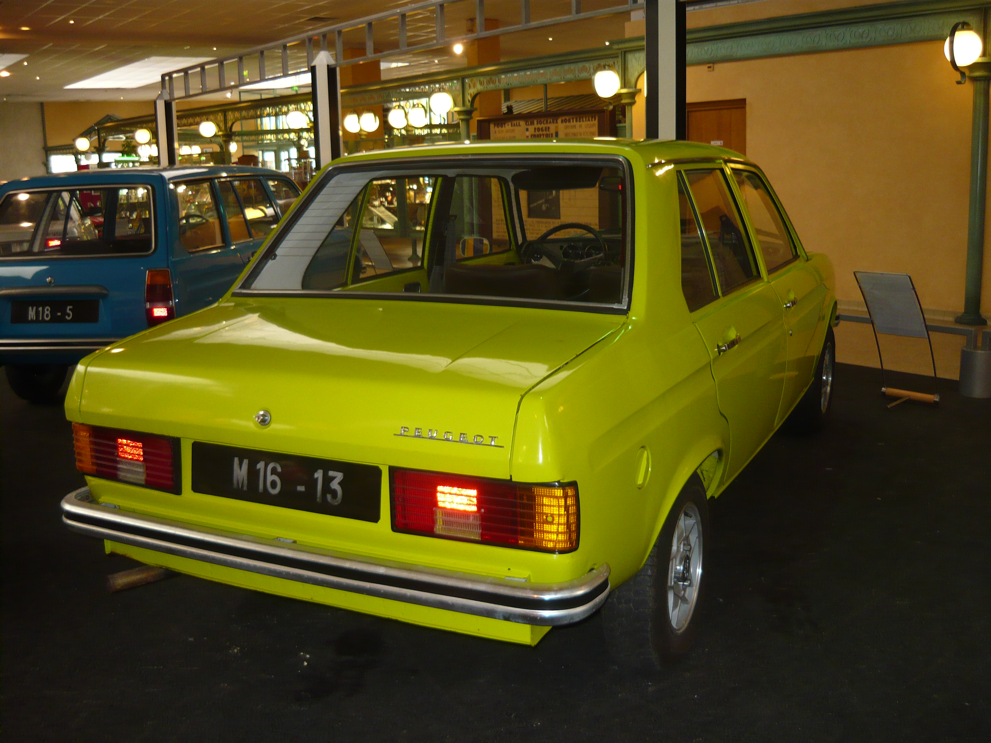 Prototype de Peugeot 104 tricorps, jamais produite en série